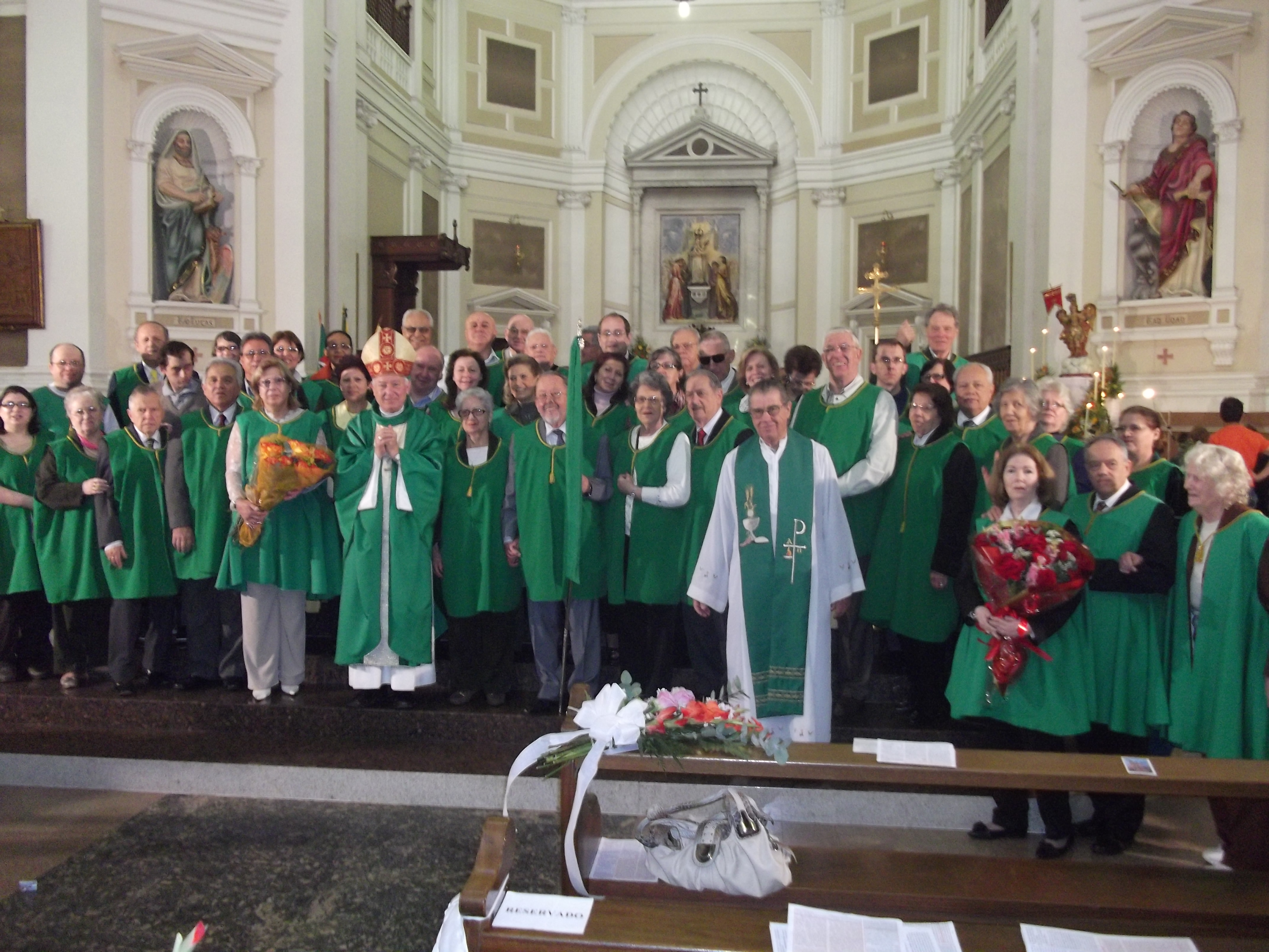 Irmandade do Arcanjo São Miguel de Almas de Porto Alegre, na Catedral de Porto Alegre, em 2012-09-30